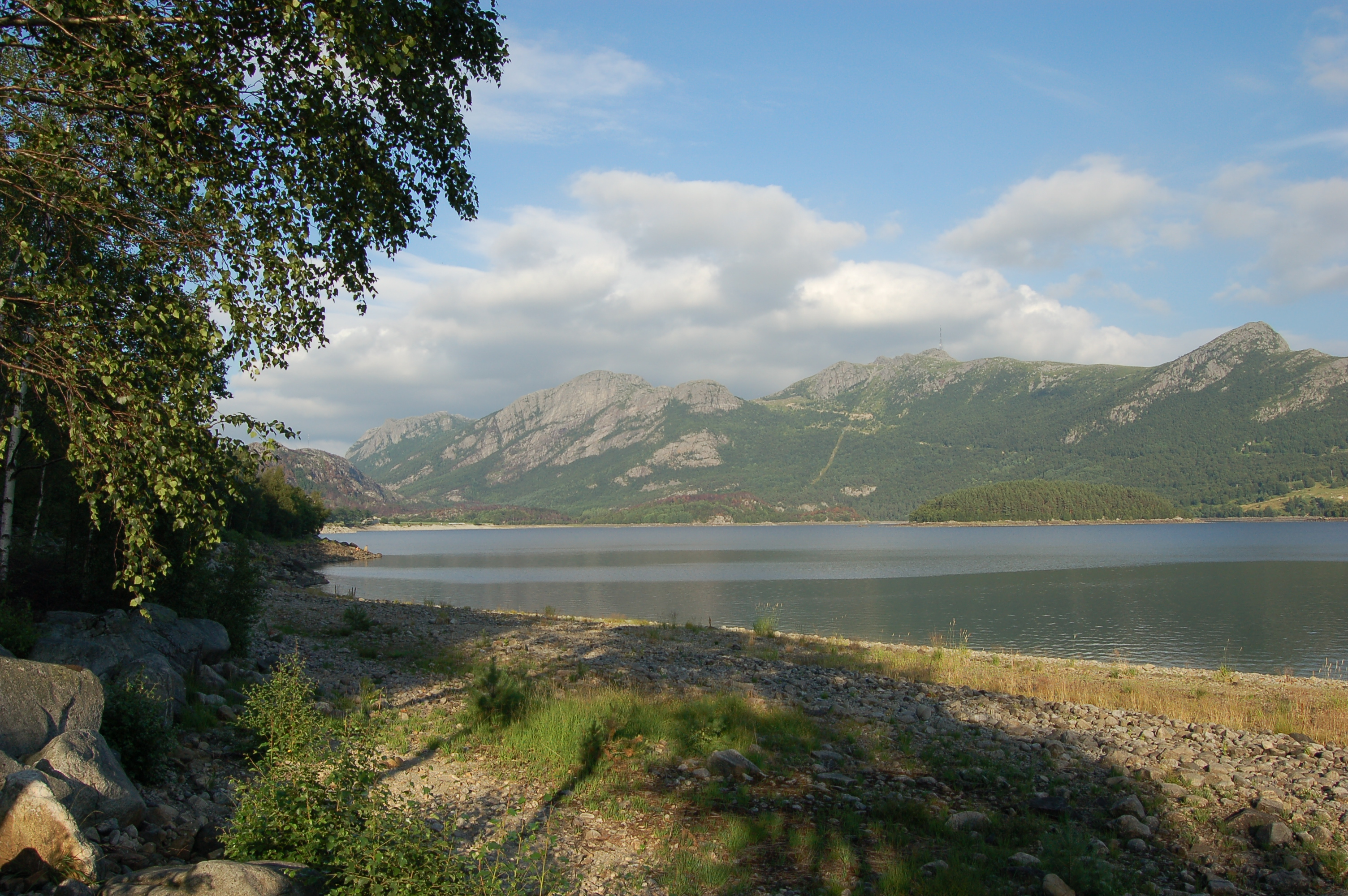 Oltedalsvatnet, a lake in Gjesdal, Norway